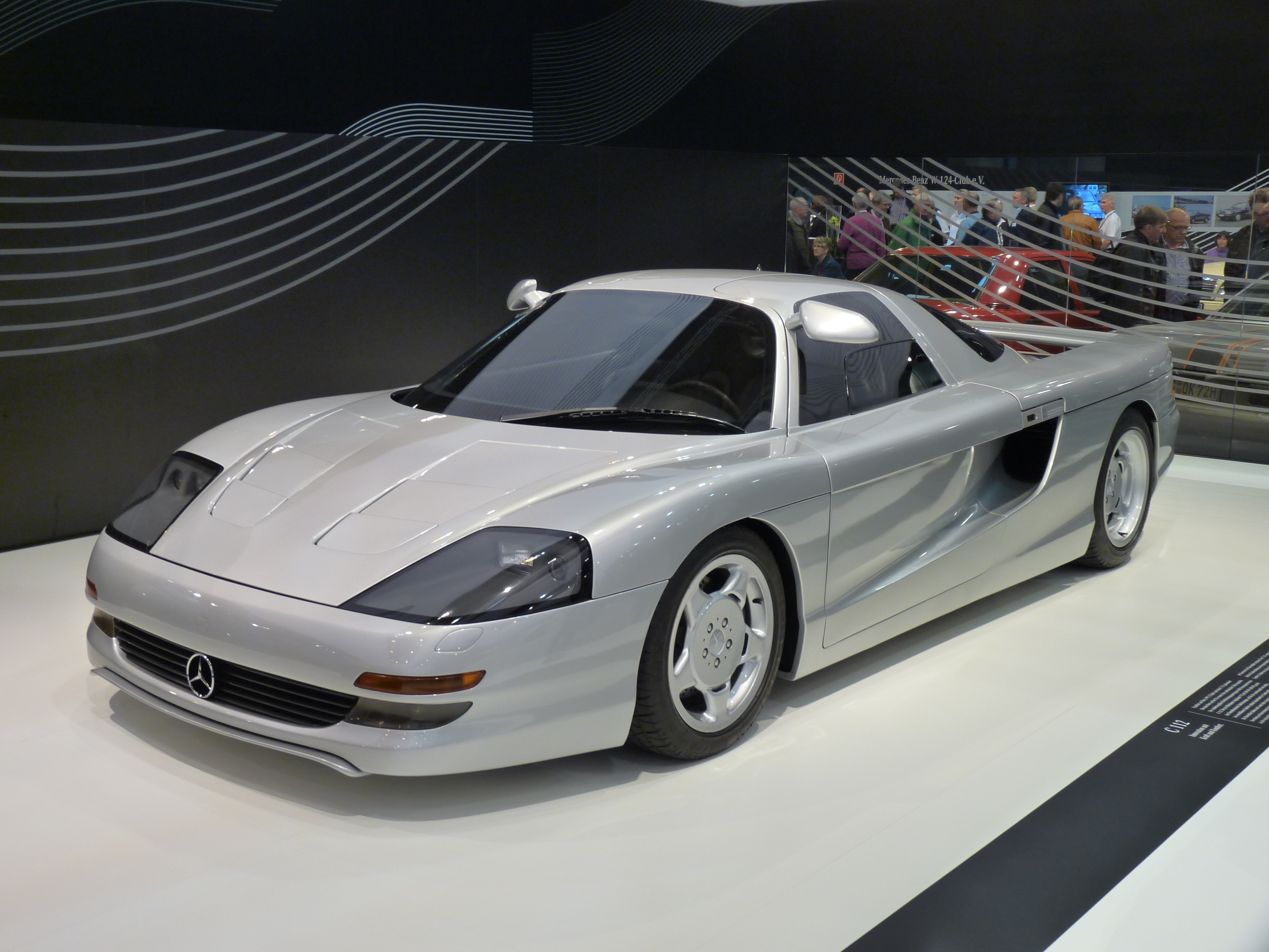 description see filename